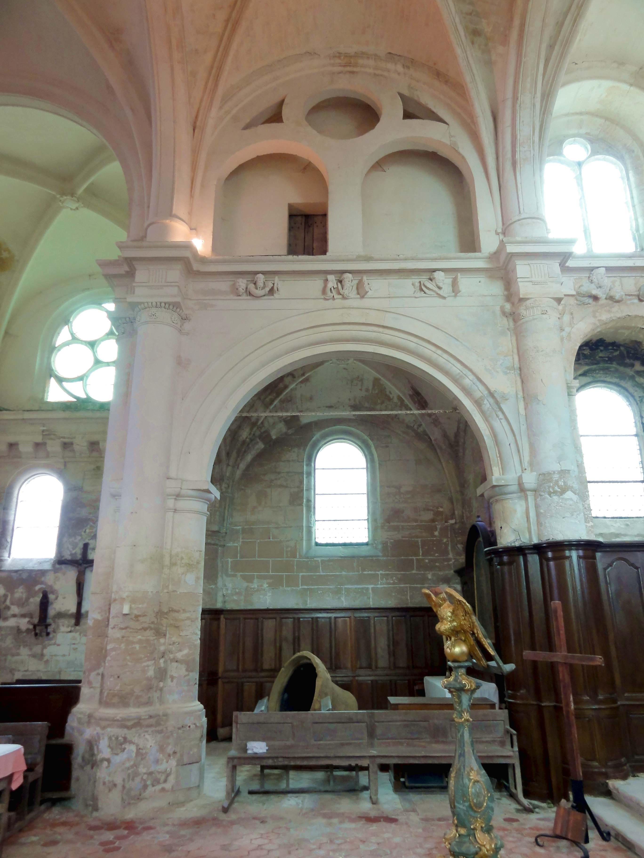 Intérieur de l'église (voir titre).